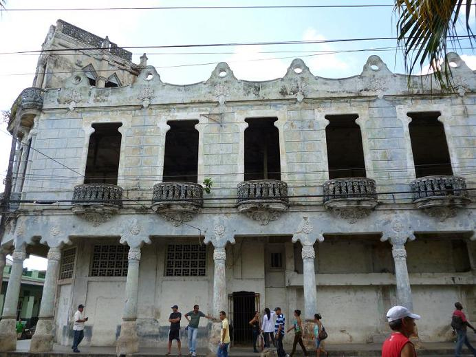 Fruti Cuba en Pinar del Río, Cuba